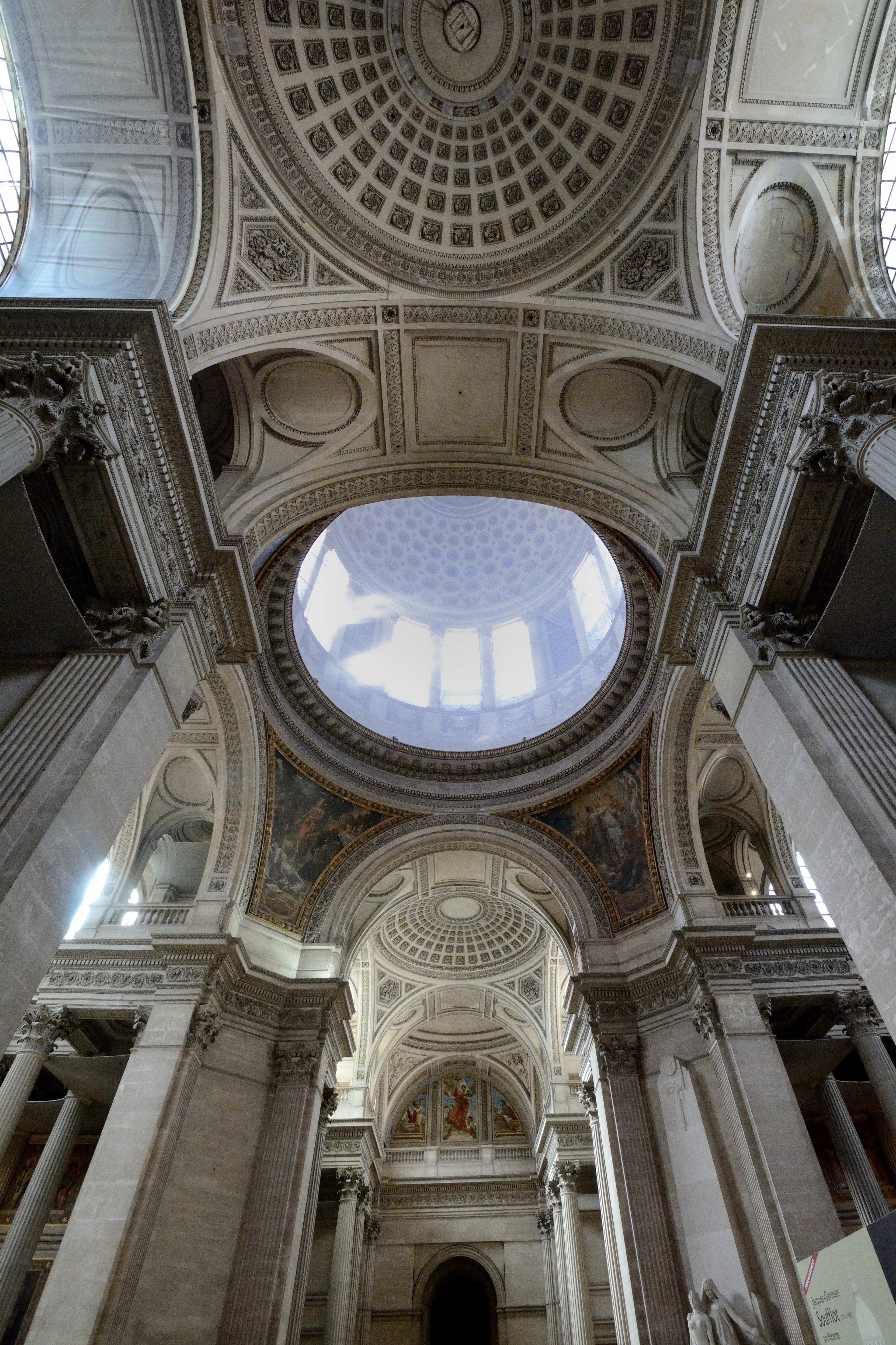 Panthéon, Inenraum